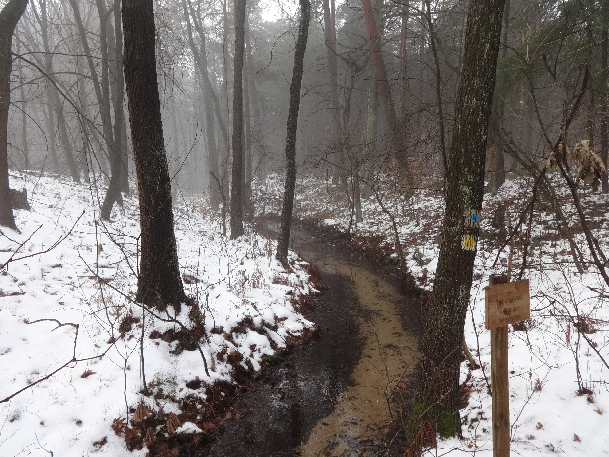 Briesengraben, Abfluss des Briesensees in Teupitz